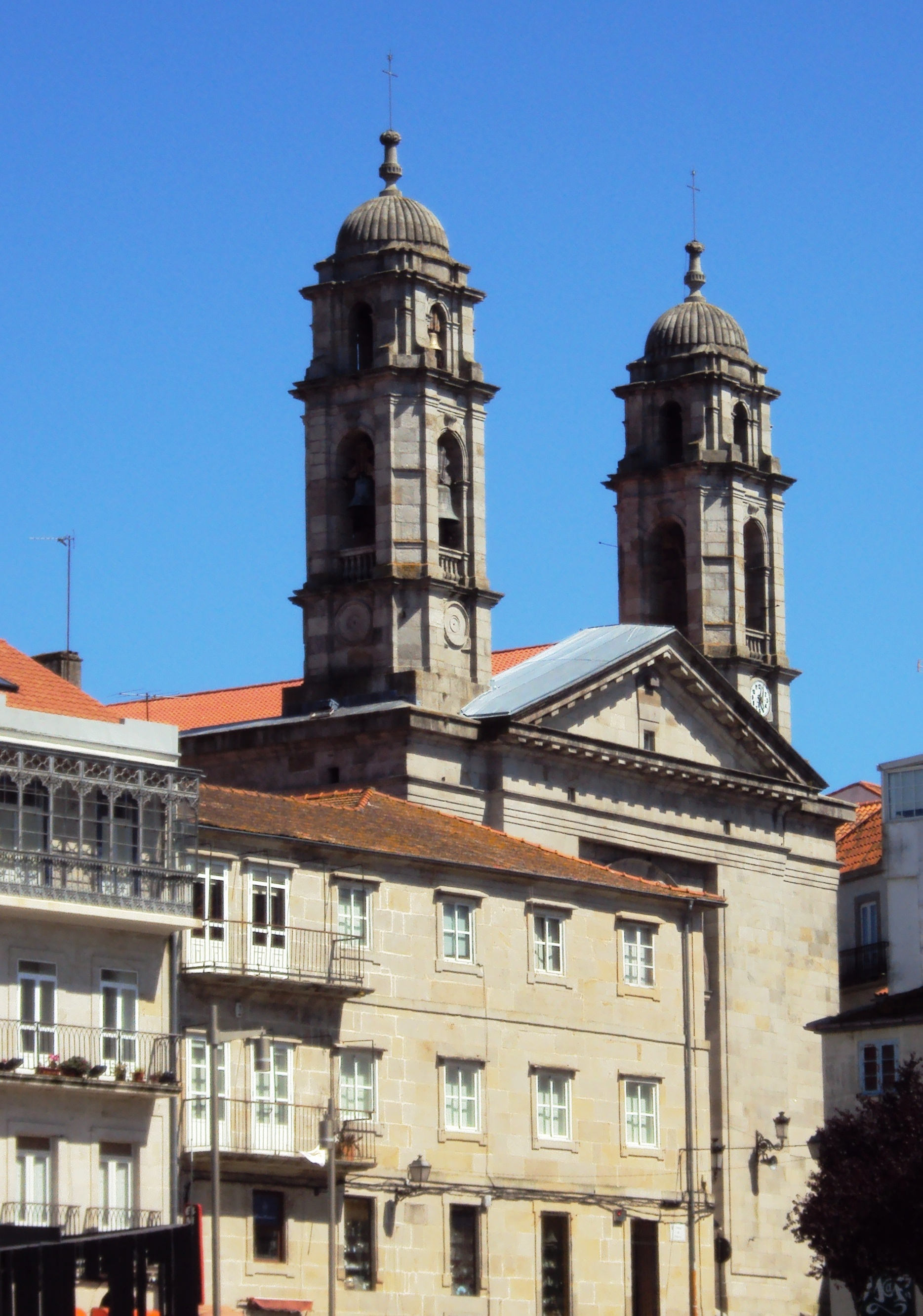 A Concatedral de Santa María de Vigo, antiga Colexiata. Iniciada en 1816 e terminada de construír en 1836, en substitución do templo gótico anterior. De estilo neoclásico, construída conforme ao proxecto do arquitecto Melchor de Prado Mariño, datado en 1811. Alberga no seu interior o soado Cristo da Vitoria que, segundo a tradición, favoreceu aos vigueses nas Guerras Napoleónicas. Cada primeiro domingo de agosto sae en procesión dentro da maior manifestación relixiosa da cidade.